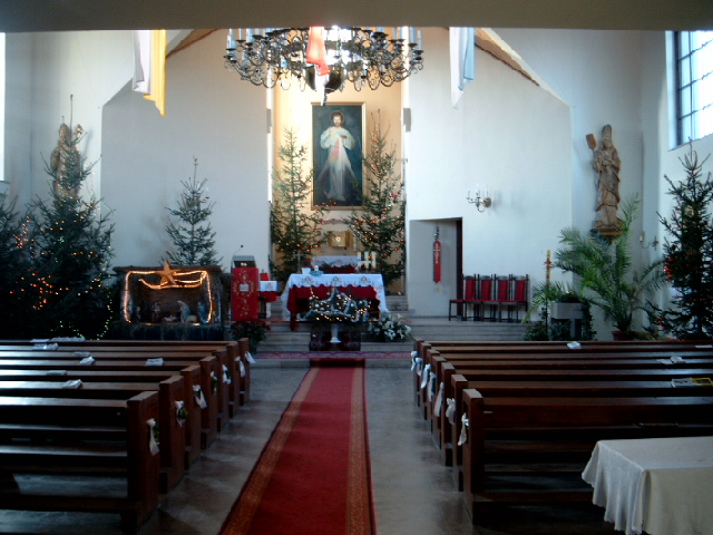 Parafia Miłosierdzia Bożego w Bobowicku- widok na obraz Jezusa Miłosiernego.